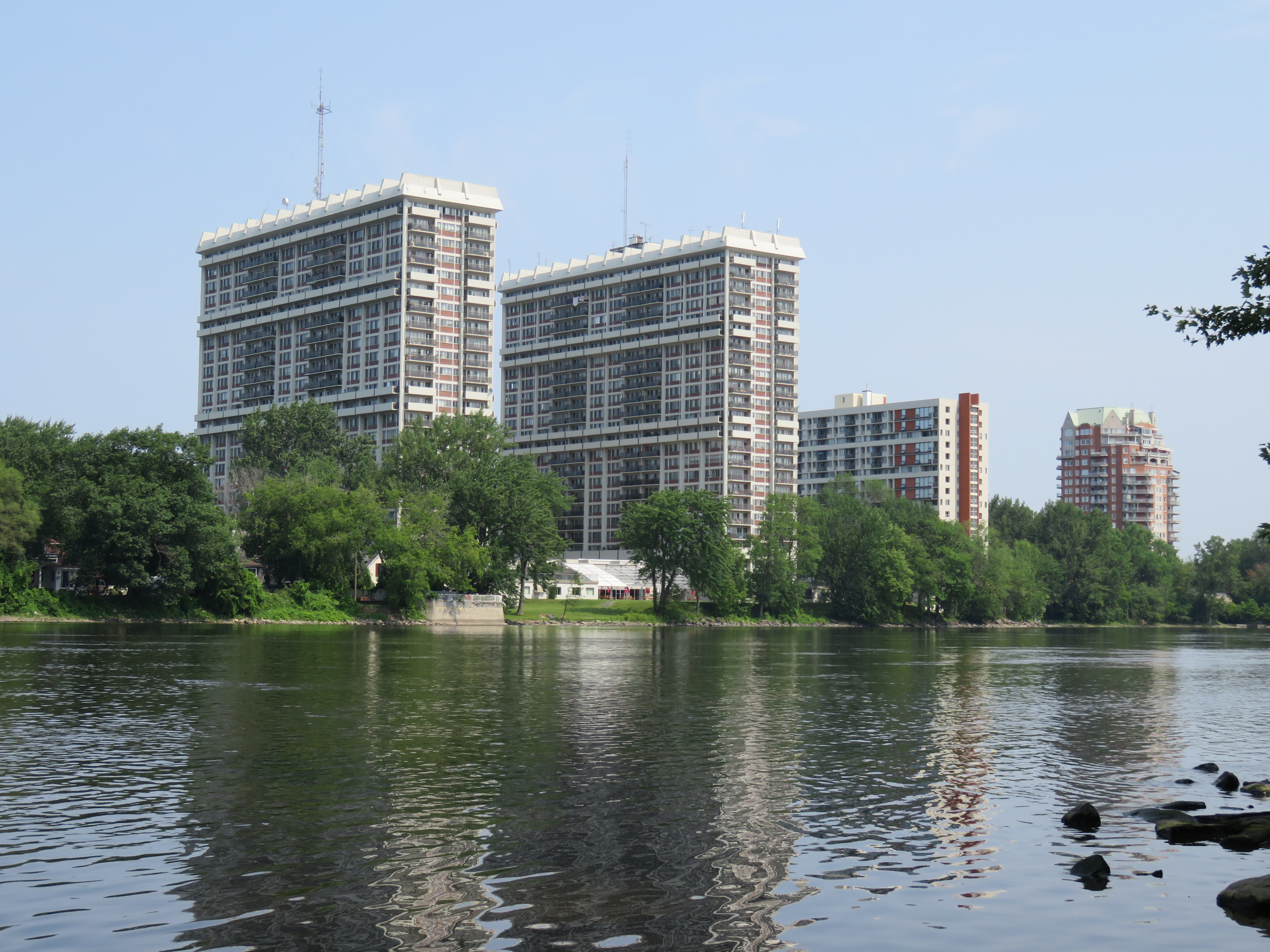 Domaine Bellerive ( édifices des 1, 3 et 5 de la Place de la Belle-Rive), et l'immeuble de condominiums Le Maritime, en bordure de la rivière des Prairies, dans le quartier Chomedey, Laval, Québec.